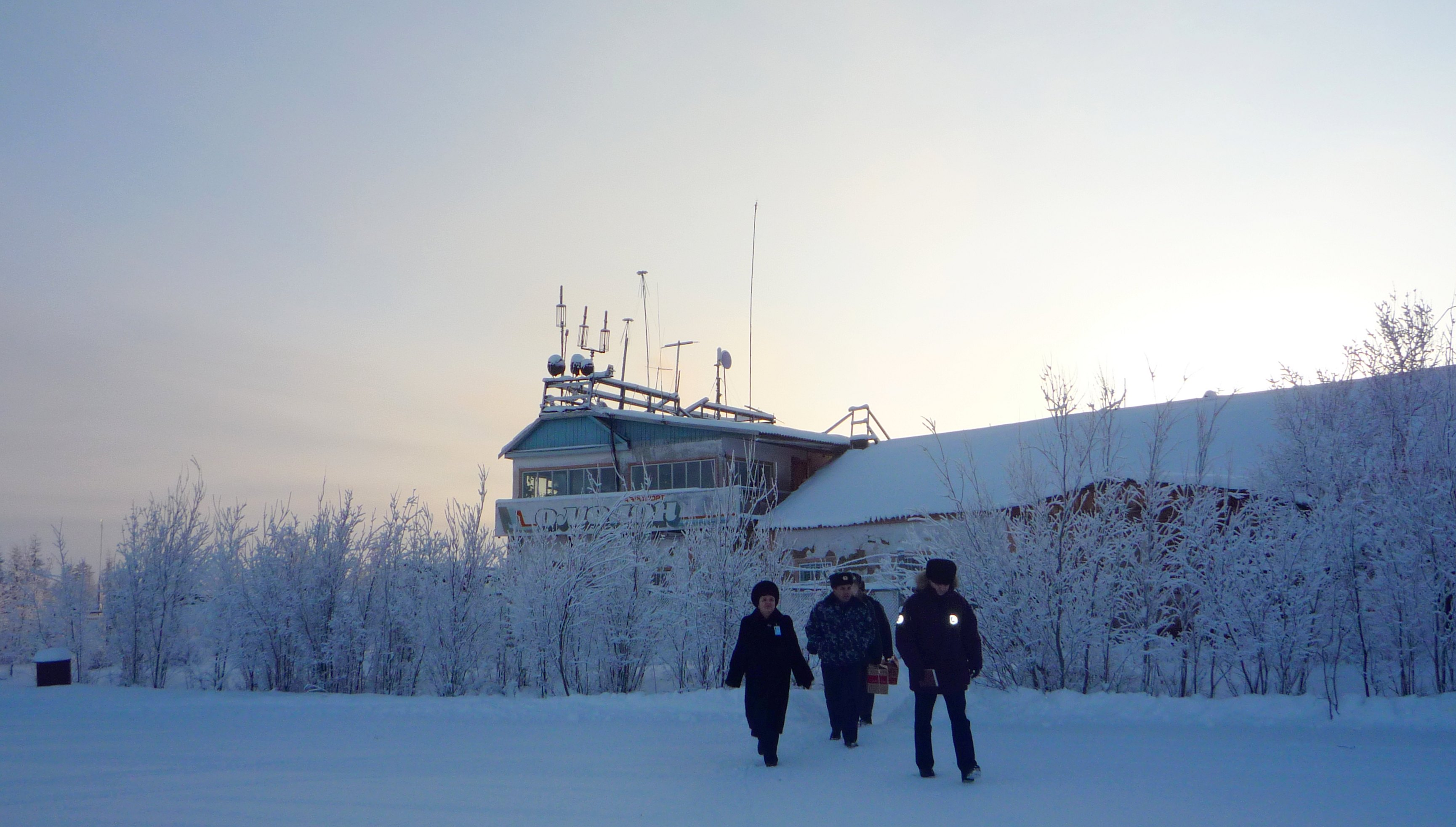 Аэропорт Омолон